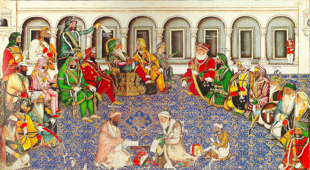 Darbar of Maharaja Ranjit Singh